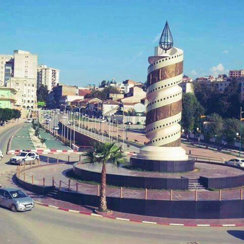 il est rialise par sculpteur algerien Bâaziz hammache